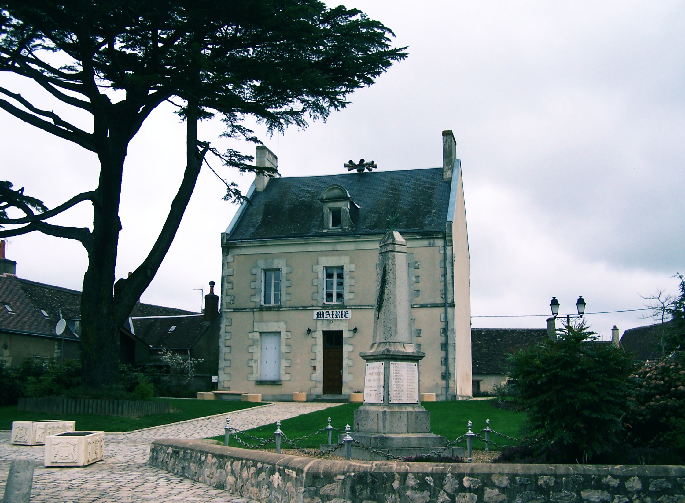 Mairie et monument aux morts de Monthodon (Indre-et-Loire, France)